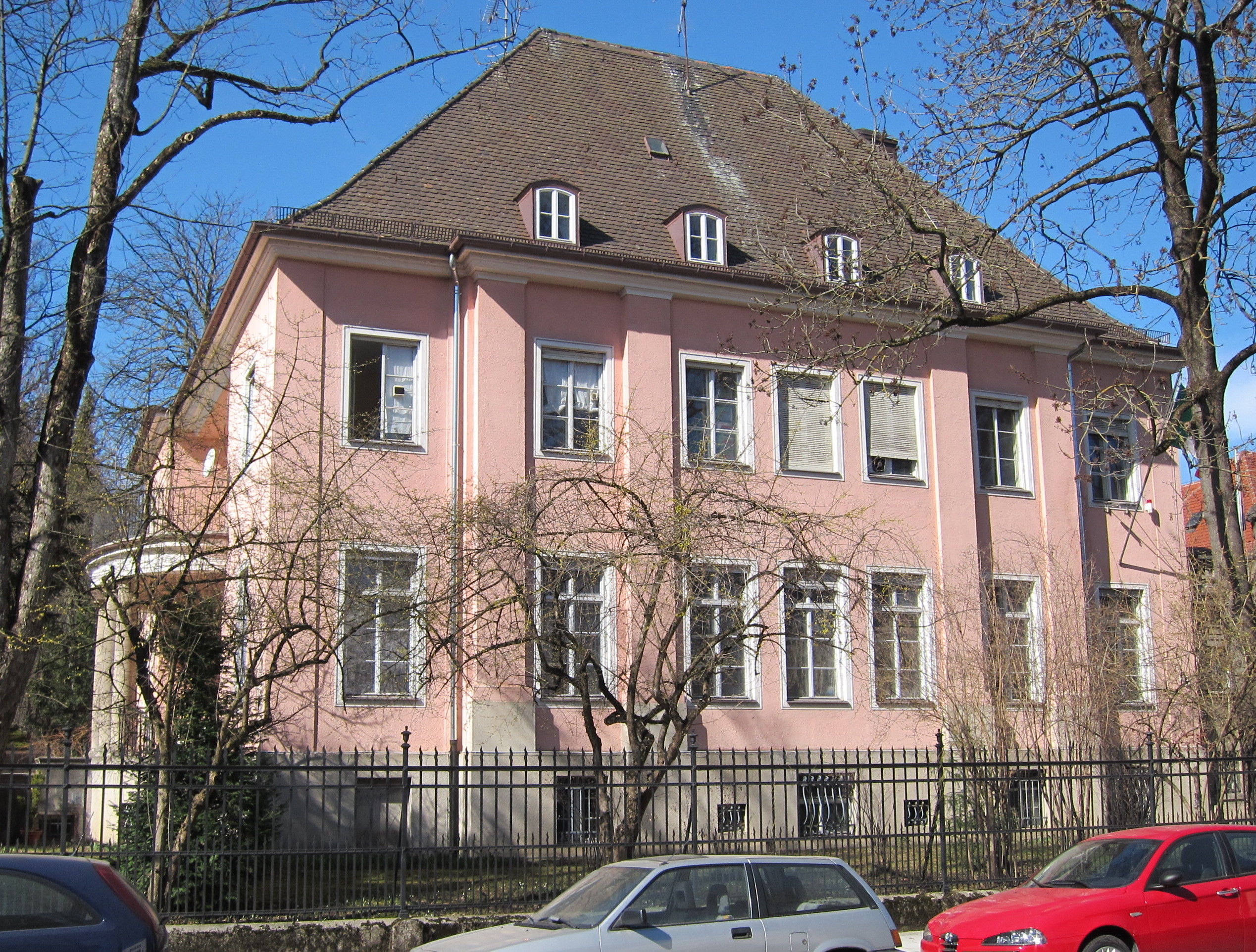 Möhlstraße 3; Italienisches Generalkonsulat, palastartige Neubarockvilla samt Nebengebäude und Torpfeilern, 1901-02 von Heilmann & Littmann.